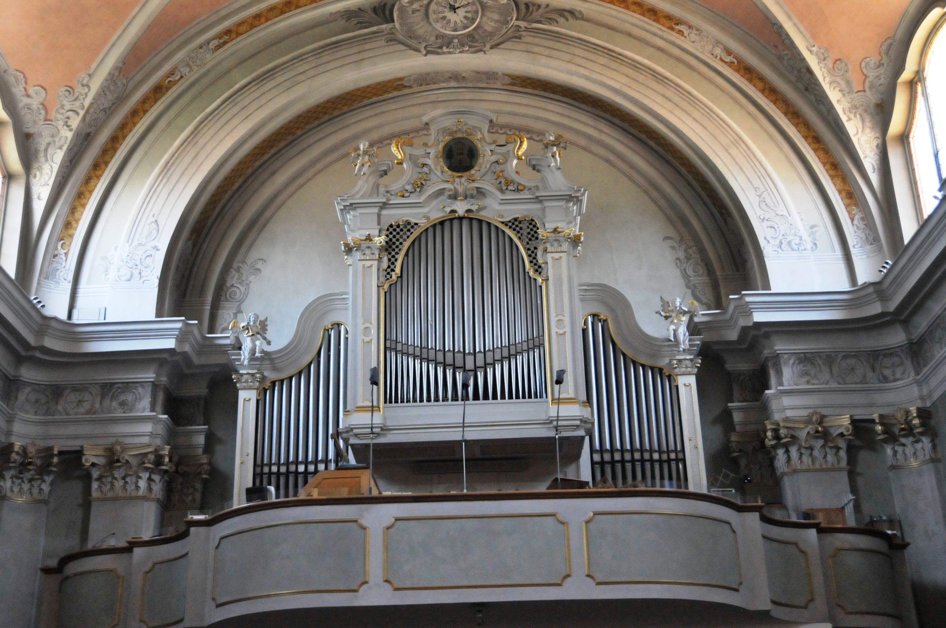 Cortina d'Ampezzo: Santi Filippo e Giacomo, Mauracher-Orgel